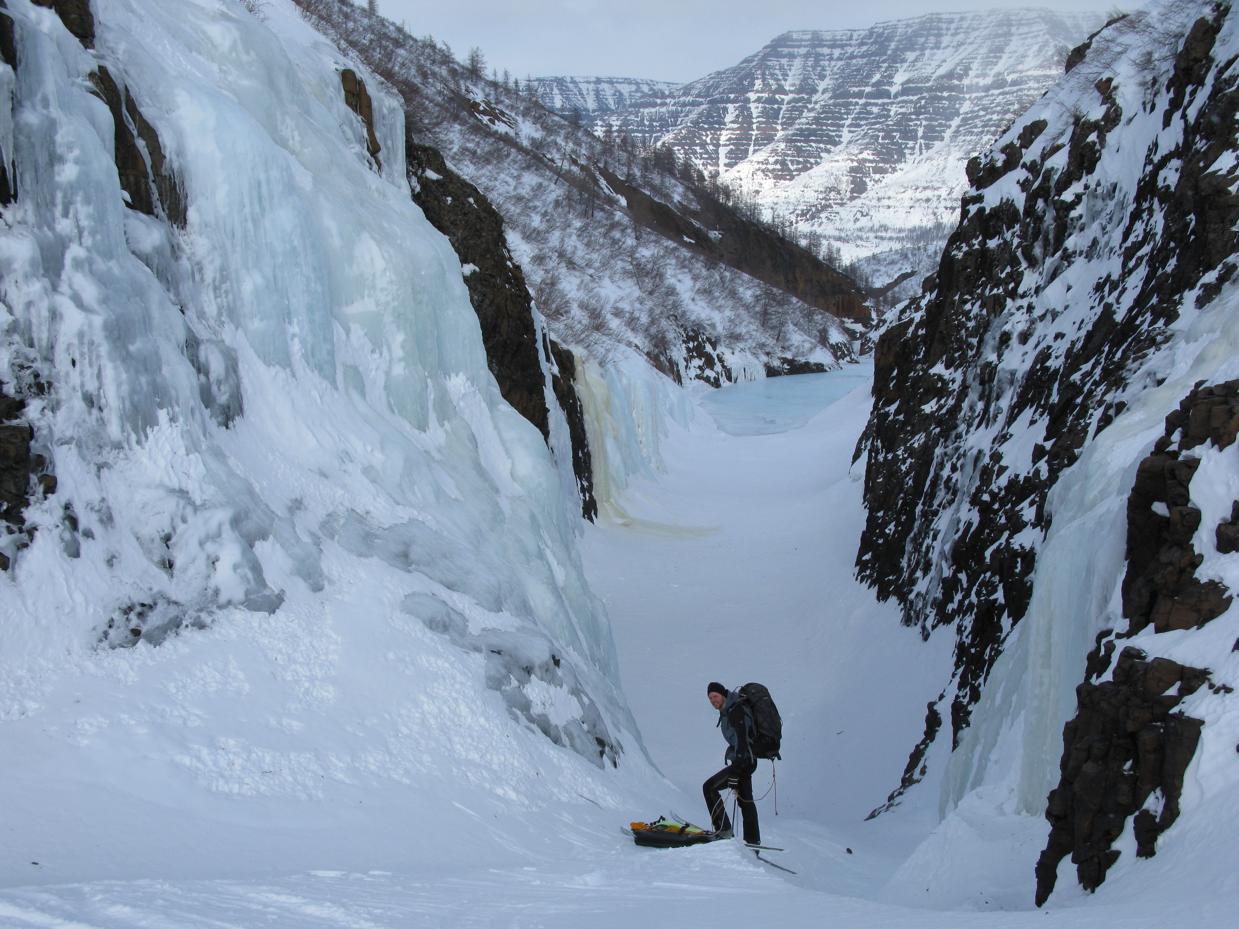 Путоранский заповедник, This image is related to the protected area of Russia number 2400003